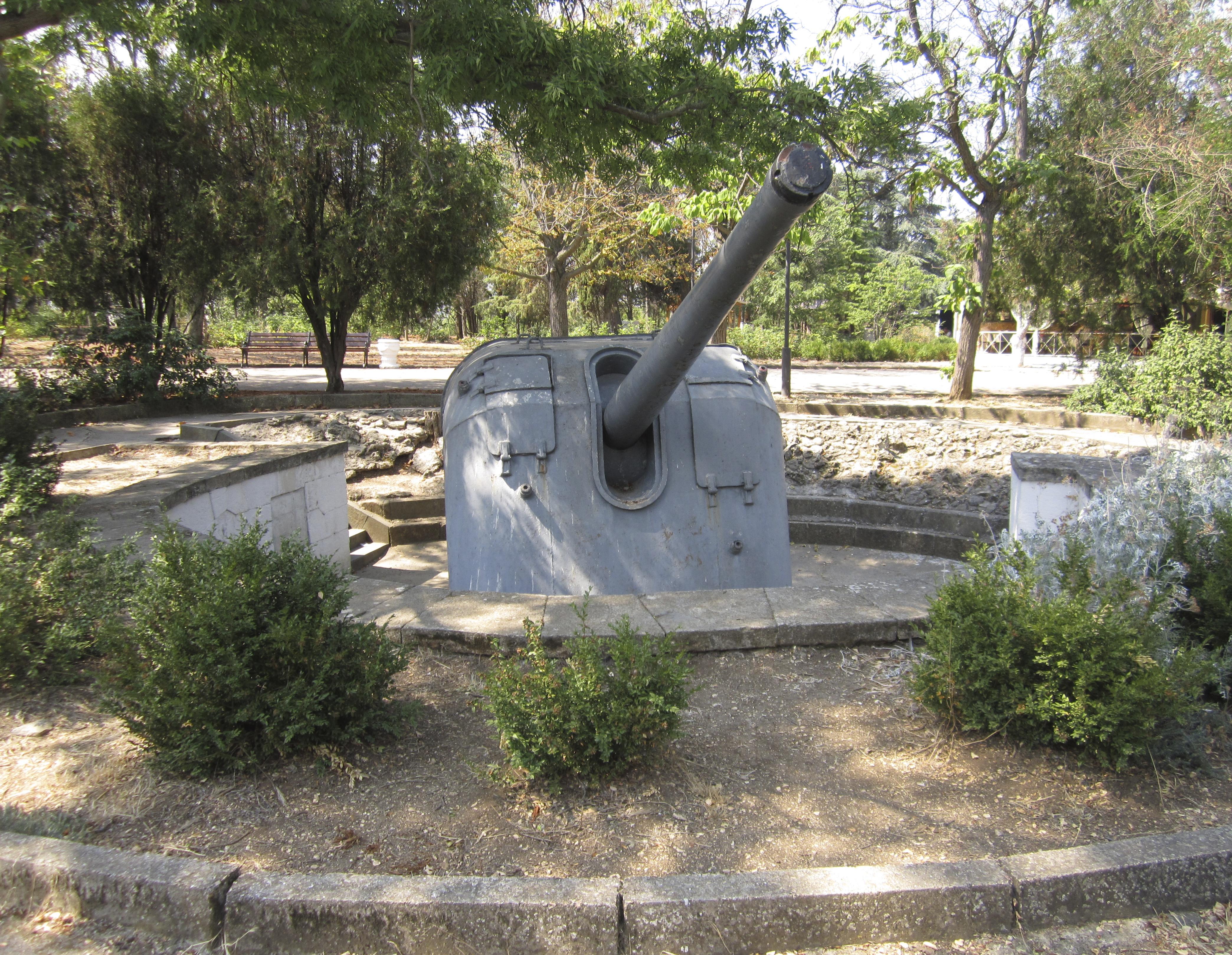 Памятное место батареи № 111 Матюхина: Малахов курган, Нахимовский район, Севастополь This object is located on the Crimean Peninsula and recognized as cultural heritage by both Russia and Ukraine under the monument ID: 9230219018/ 85-369-0020, respectively. The legal status of the Crimean region is currently disputed.